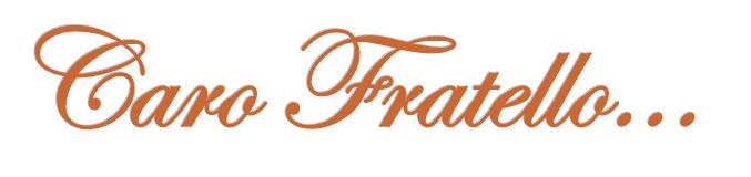 Replica del logo della serie anime Caro fratello tratto dall'omonimo anime di Riyoko Ikeda